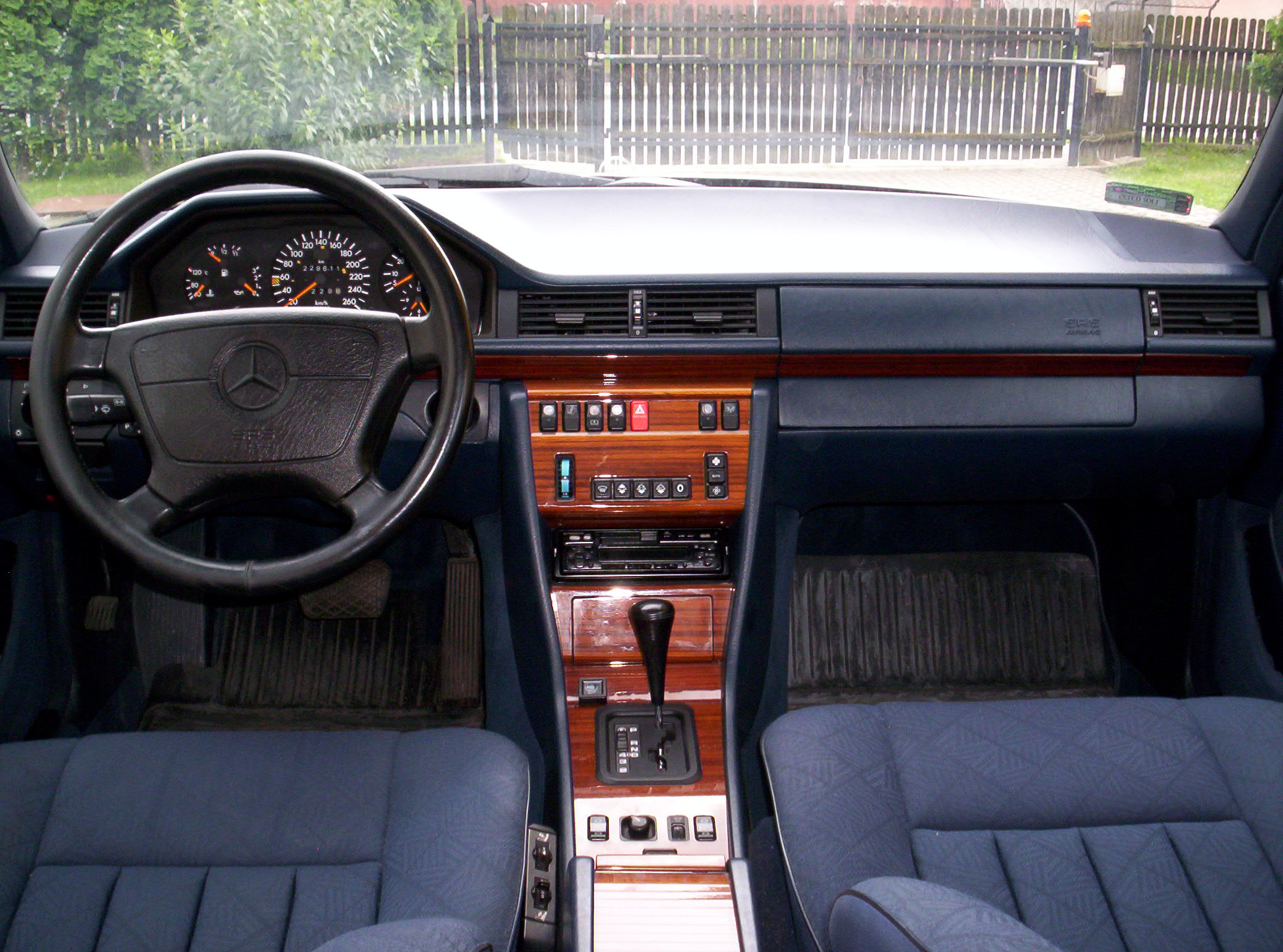 Wnętrze samochodu Mercedes-Benz W124 E280 z widoczną w pełni kolumną sterowania.